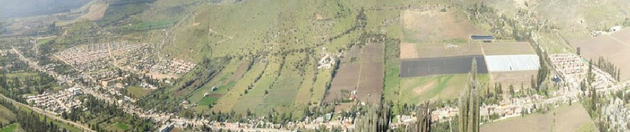 Panoramica de Punitaqui desde Cerro Grande.